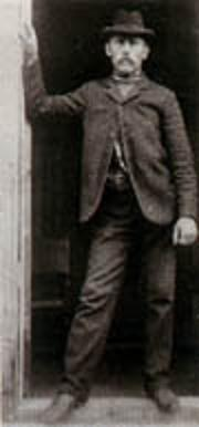 Foto föreställande Mus-Olle